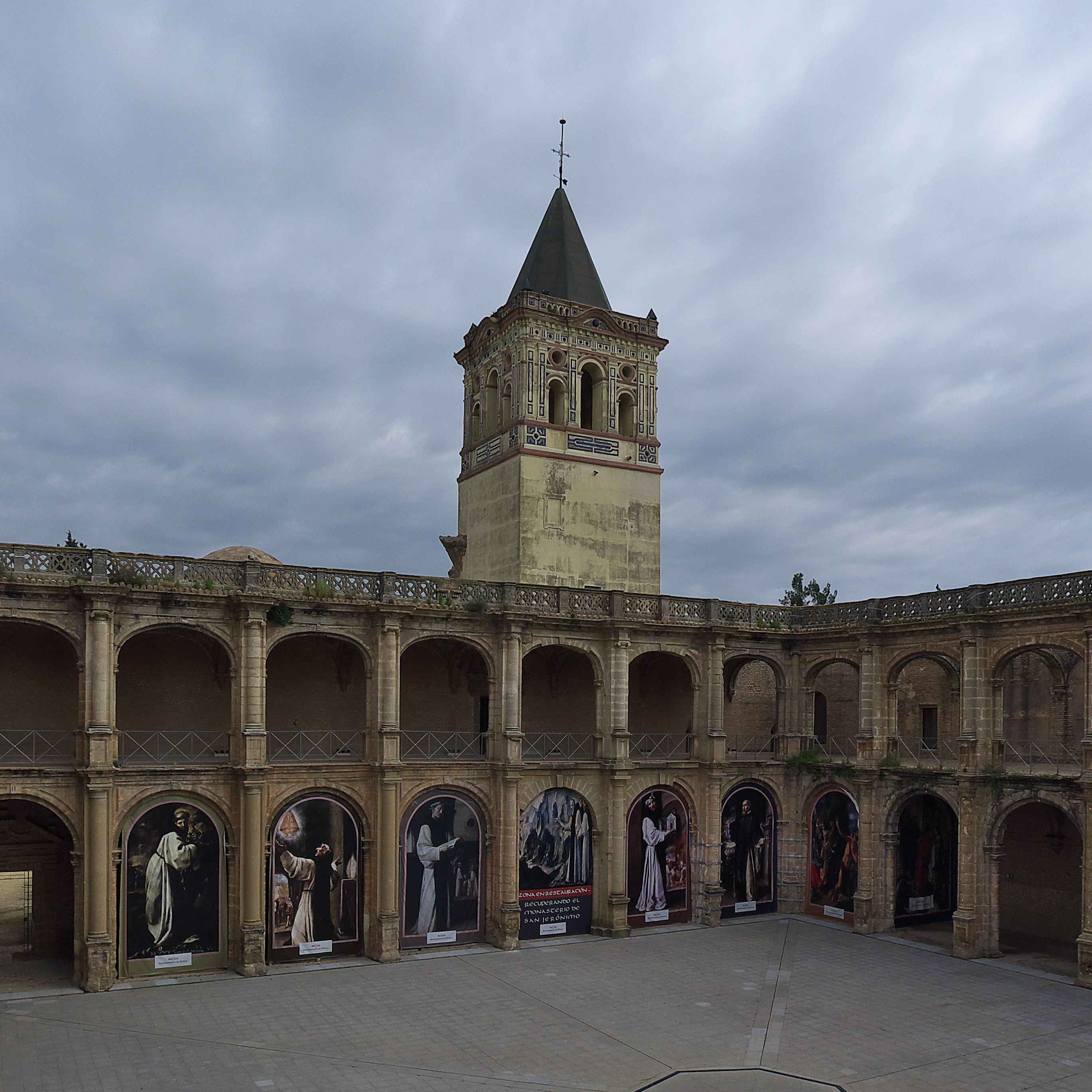 Vista de la torre-campanario desde el claustro. Su cuerpo superior, imitando al de la Giralda, es obra de Hernán Ruiz II o discípulo. En el año 1656 es contratado Juan de Valdés Leal para decorar la sacristía del monasterio con pinturas sobre la vida de san Jerónimo y frayles y monjas relevantes de la Orden. En el año 1835, éstas, se trasladan a otros museos españoles o vendidas ilegalmente. Fray Vasco de Portugal, Gemäldegalerie Alte Meister Fray Alonso de Ocaña, Museo de Grenoble